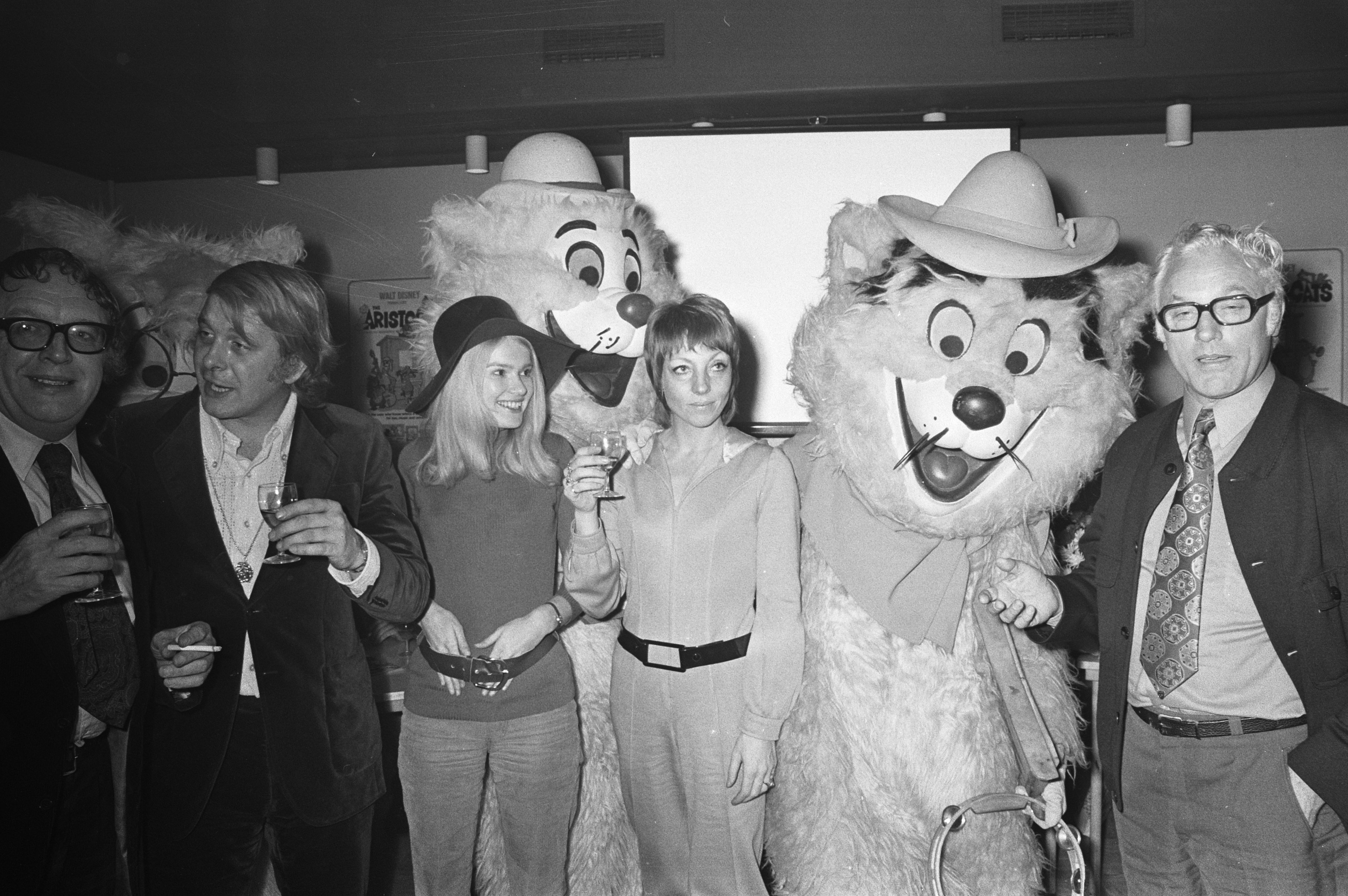 Collectie / Archief : Fotocollectie Anefo Reportage / Serie : [ onbekend ] Beschrijving : Aristocats, figuren uit Disneyfilm in Bijenkorf te Amsterdam; Henk van der Molen, Ger Smit, Martine Bijl, Carry Tefsen en Piet Ekel met Aristocats Datum : 18 november 1971 Locatie : Amsterdam, Noord-Holland Trefwoorden : FIGUREN, acteurs, toneelspelers Persoonsnaam : Bijl, Martine, Ekel, Piet, Molen, Henk van der, Smit, Ger, Tefsen, Carry Fotograaf : Croes, Rob C. / Anefo Auteursrechthebbende : Nationaal Archief Materiaalsoort : Negatief (zwart/wit) Nummer archiefinventaris : bekijk toegang 2.24.01.05 Bestanddeelnummer : 925-1542